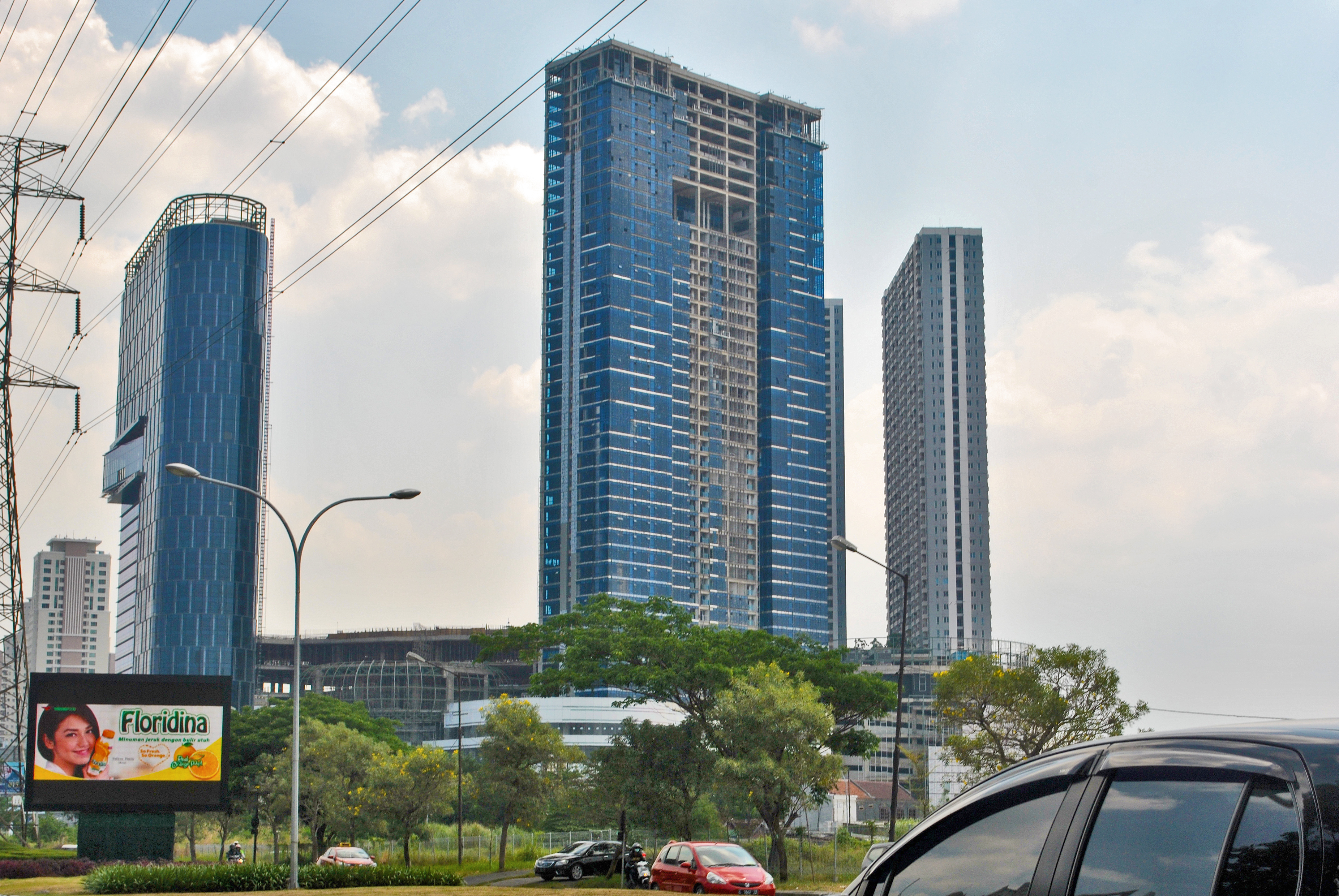 Expansion buildings and skyscrapers of Pakuwon Trade Centre shopping centre, under construction. Gedung-gedung kompleks perluasan Pakuwon Trade Centre, sedang dalam tahap pembangunan.